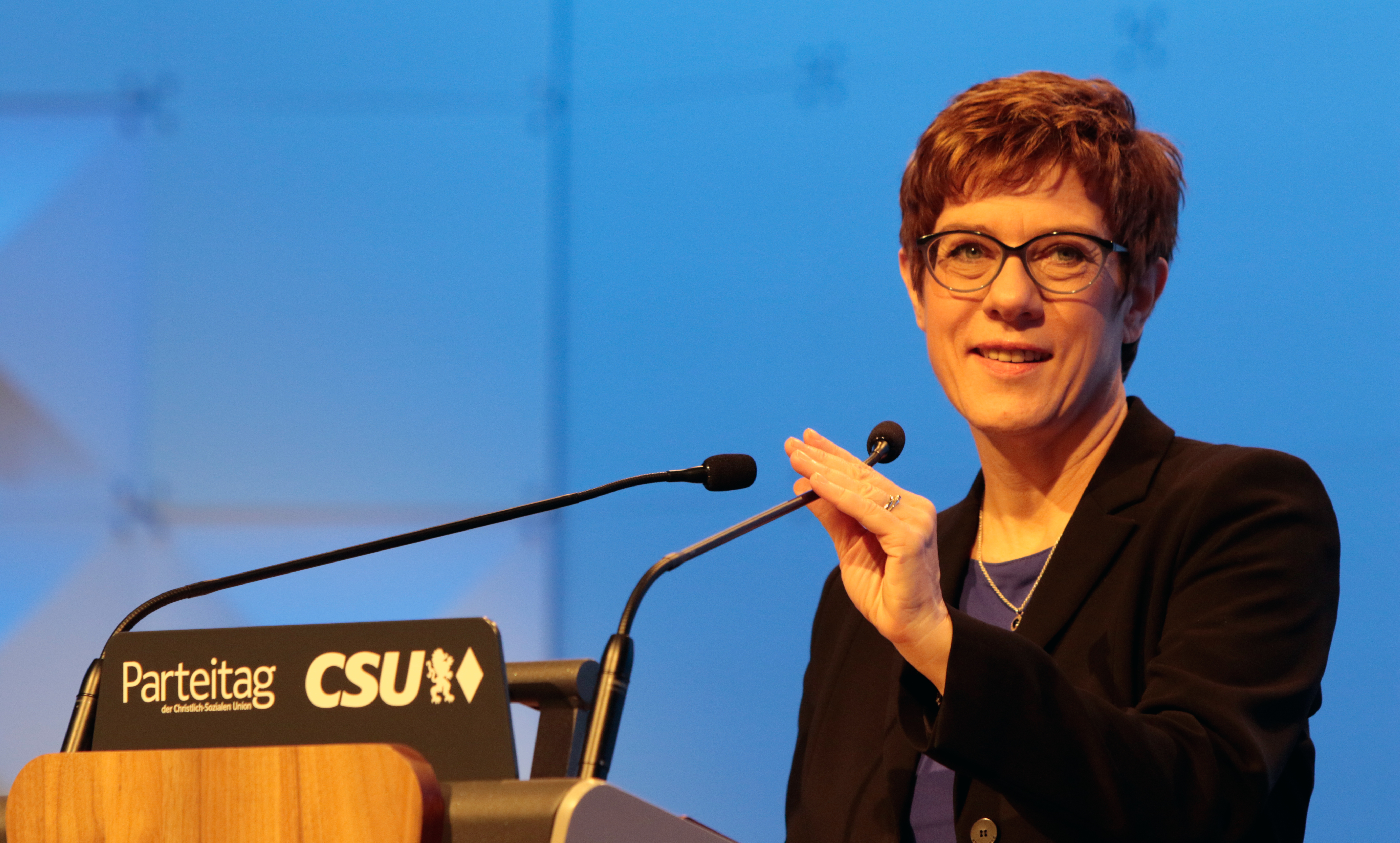 Annegret Kramp-Karrenbauer auf dem CSU-Parteitag in der Kleinen Olympiahalle in München am 19.01.2019.